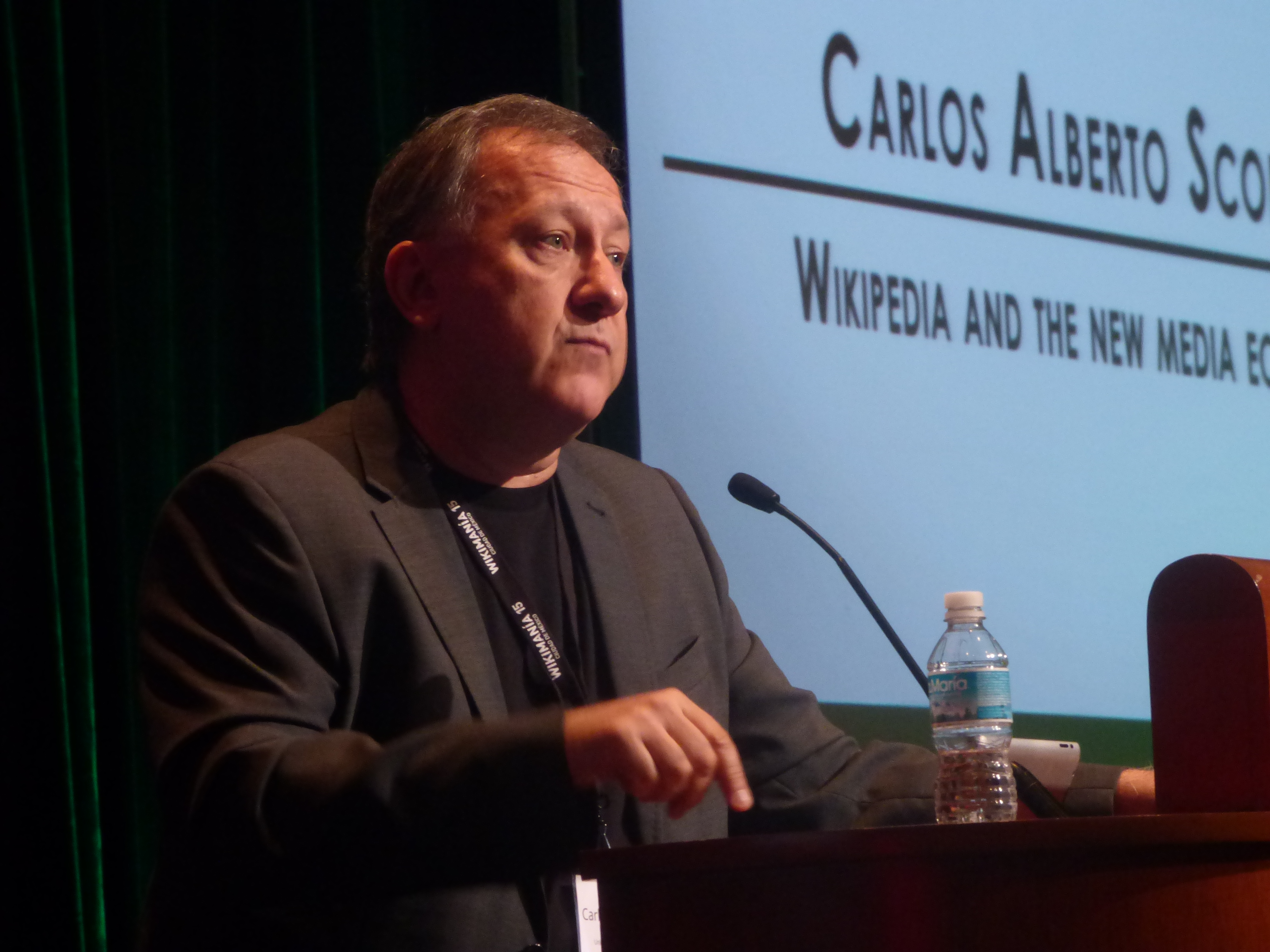 Carlos A. Scolari en Wikimania 2015, dando una ponencia sobre Wikipedia y la evolución de los medios digitales